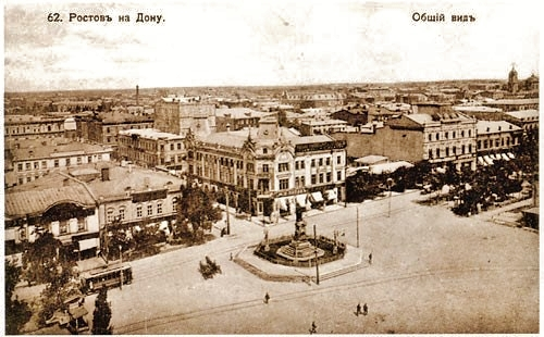 Rostov sul Don ai primi del 1900